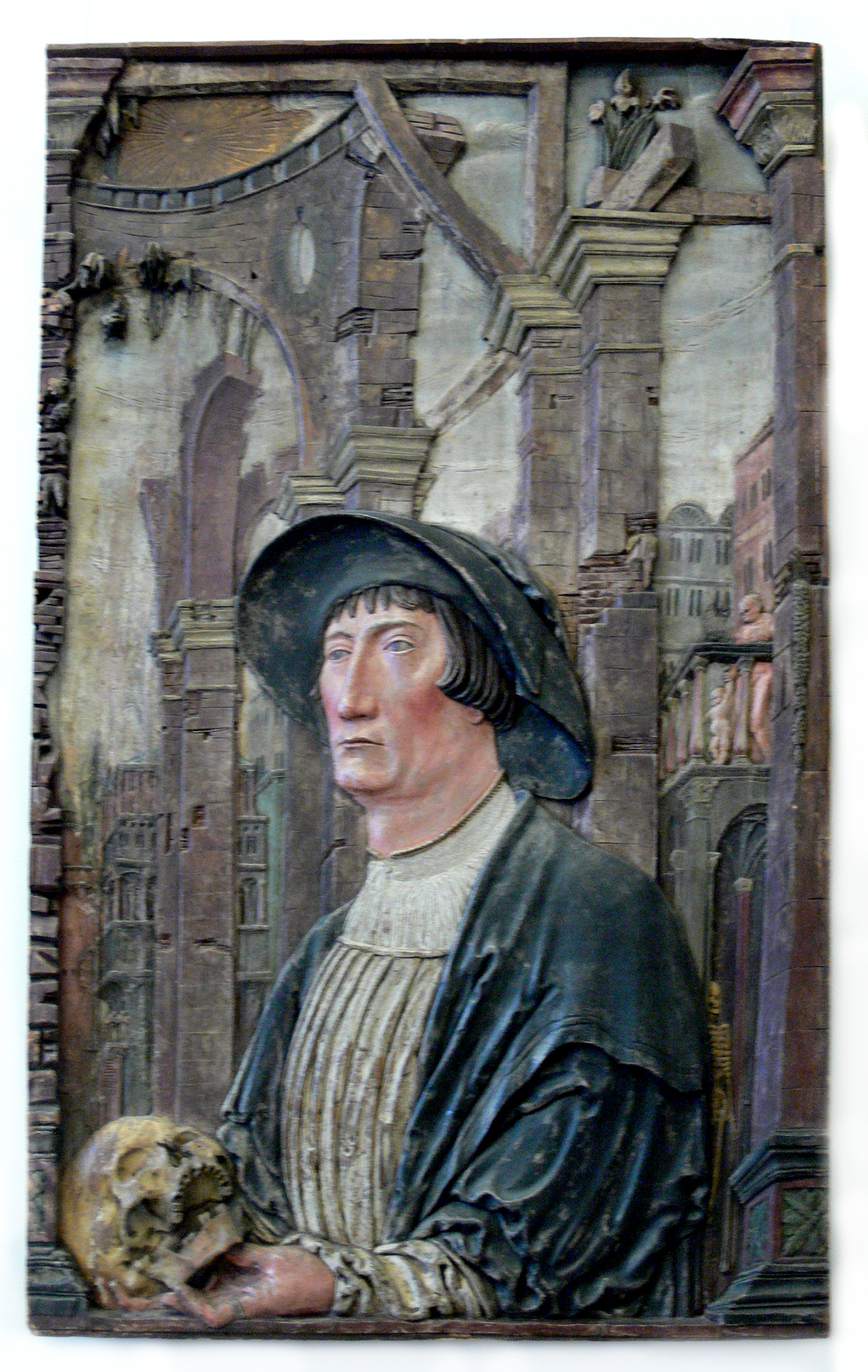 Hans Schenck, gen. Scheutzlich (um 1500–1566/72?)